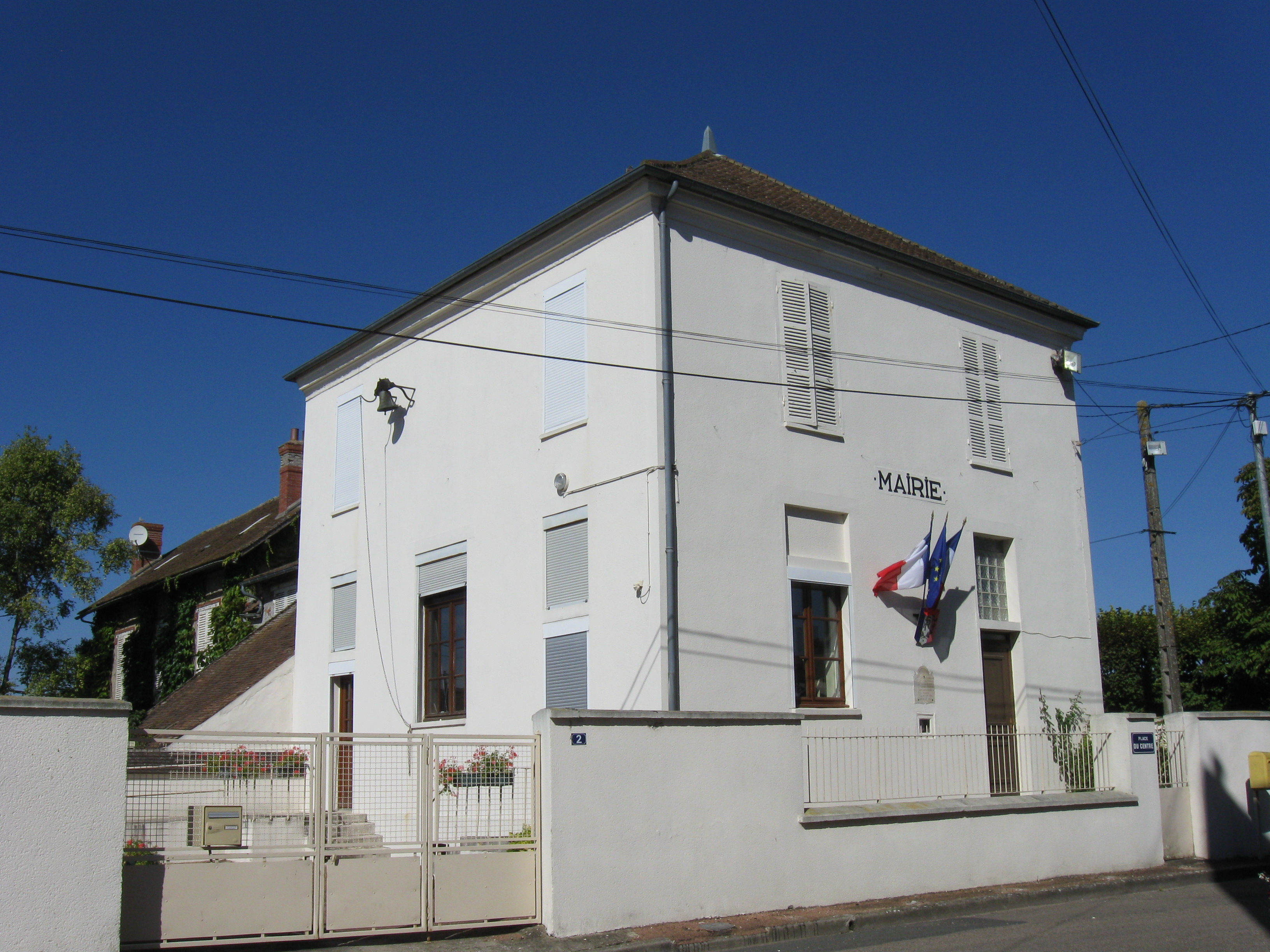 Mairie d'Obsonville. (Seine-et-Marne, région Île-de-France).